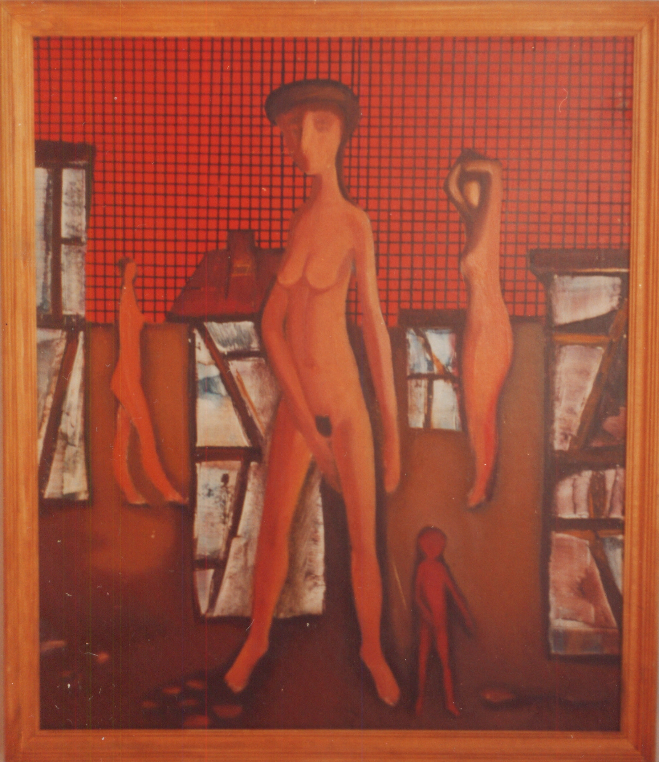 Окна. 1997 г., двп, масло, 70 см × 59 см